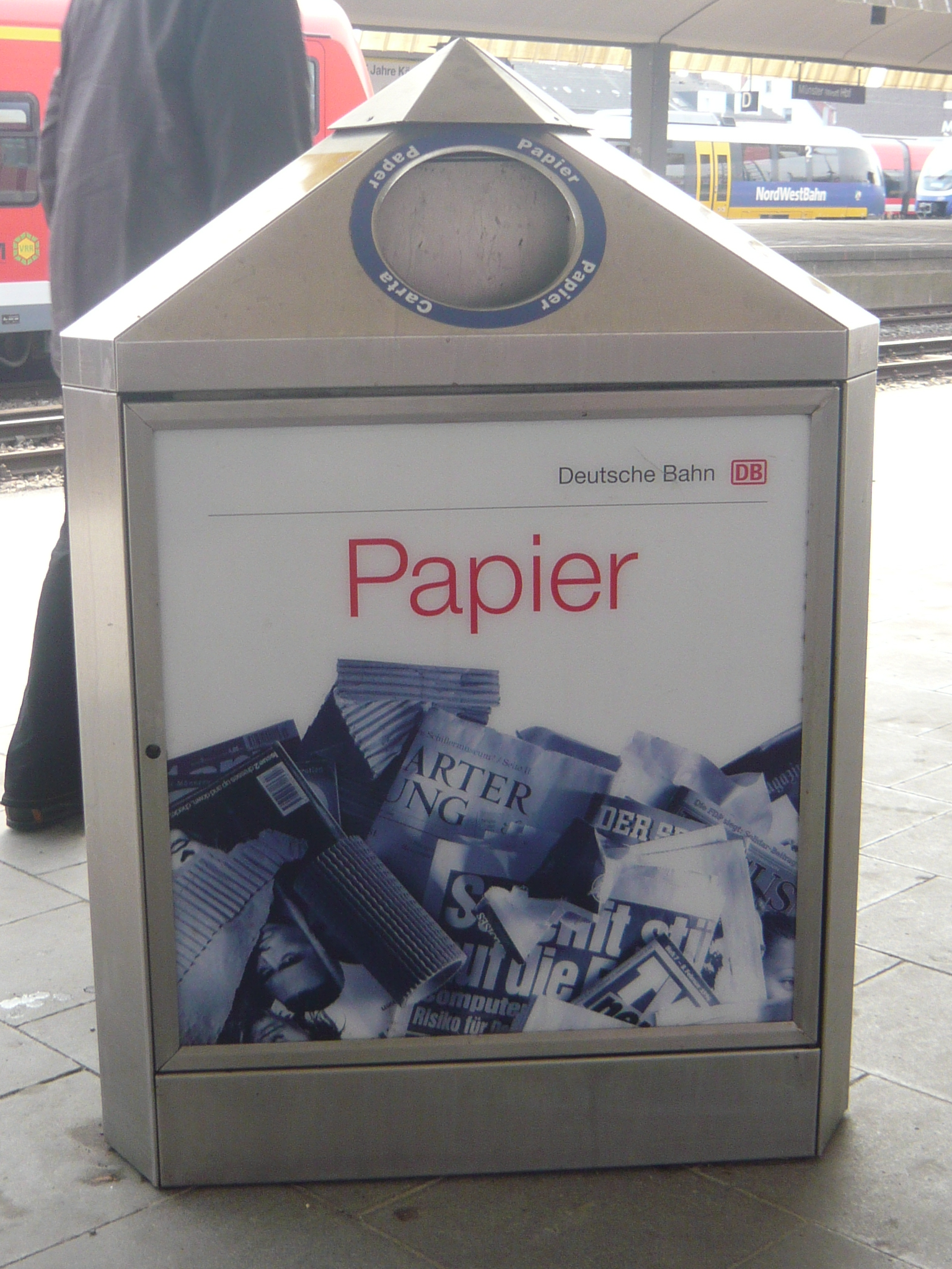 Deutsche Bahn Mülltrennung - Papier